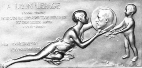 Mémorial Léon Lepage par Eugène de Bremaecker.